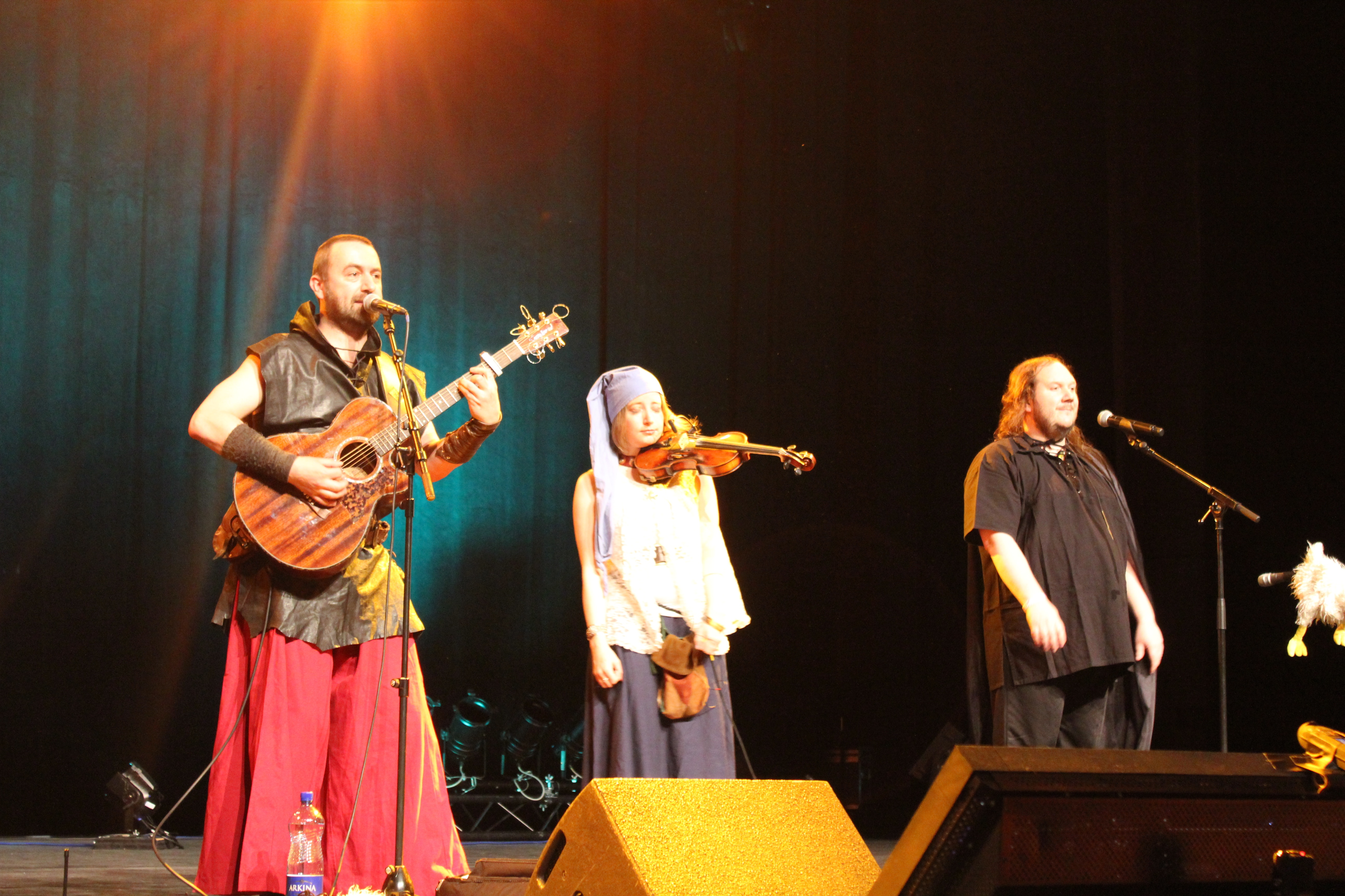 Le Naheulband en concert à l’Auditorium Stravinski à Montreux (Suisse), pendant Polymanga, le 20 avril 2014.